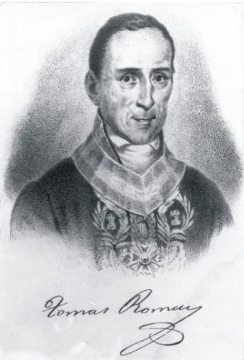 Médico cubano. Científico de excelencia del siglo XVIII y XIX.